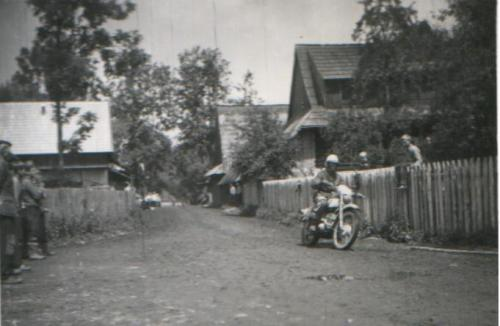 Jedna z ulic w Długopolu